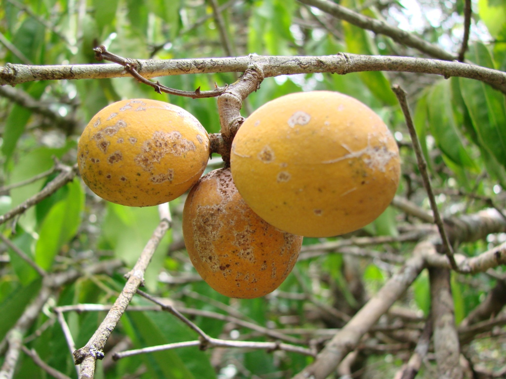 Cheiloclinium cognatum (Miers) A.C.Sm. - (Sin. hom. Salacia cognata; sin. het. Cheiloclinium lineolatum) - CELASTRACEAE - Jardim Botânico de Brasília - Distrito Federal - Brasil.